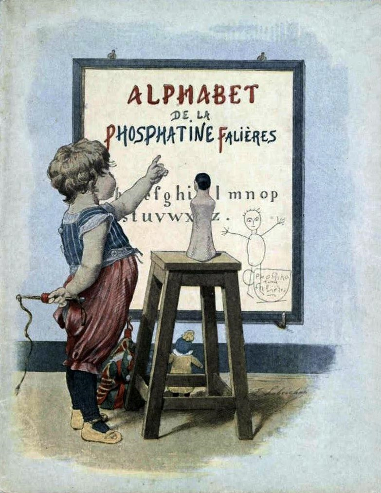 Abécédaire du Fonds de Conservation Jeunesse de la Bibliothèque Municipale de Toulouse